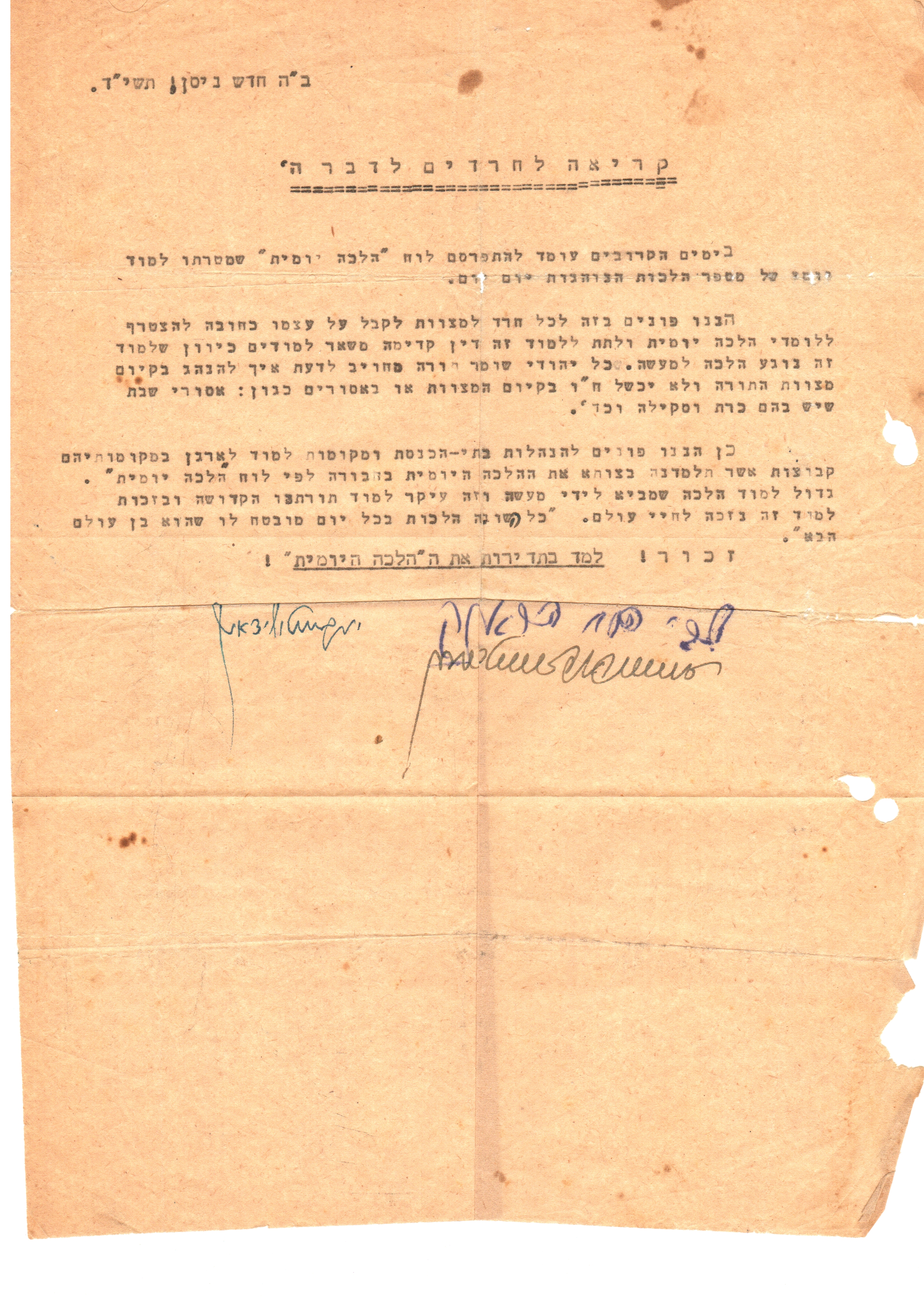 רבה של ירושלים במכתב וקריאה להצטרף ללמוד את ההלכה היומית שיזם הרב יונה שטנצל יוזם לימוד ההלכה היומית